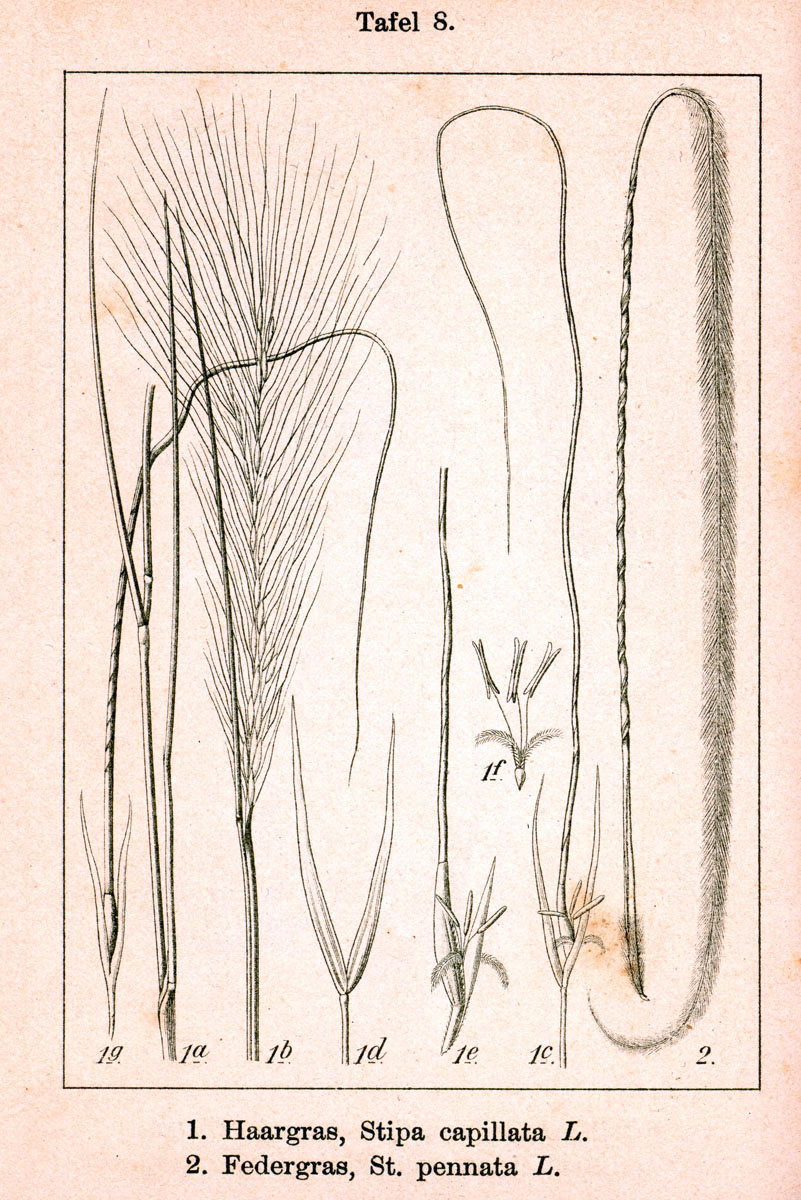 Original Description 1. Haargras, Stipa capillata L. 2. Federgras, Stipa pennata L.